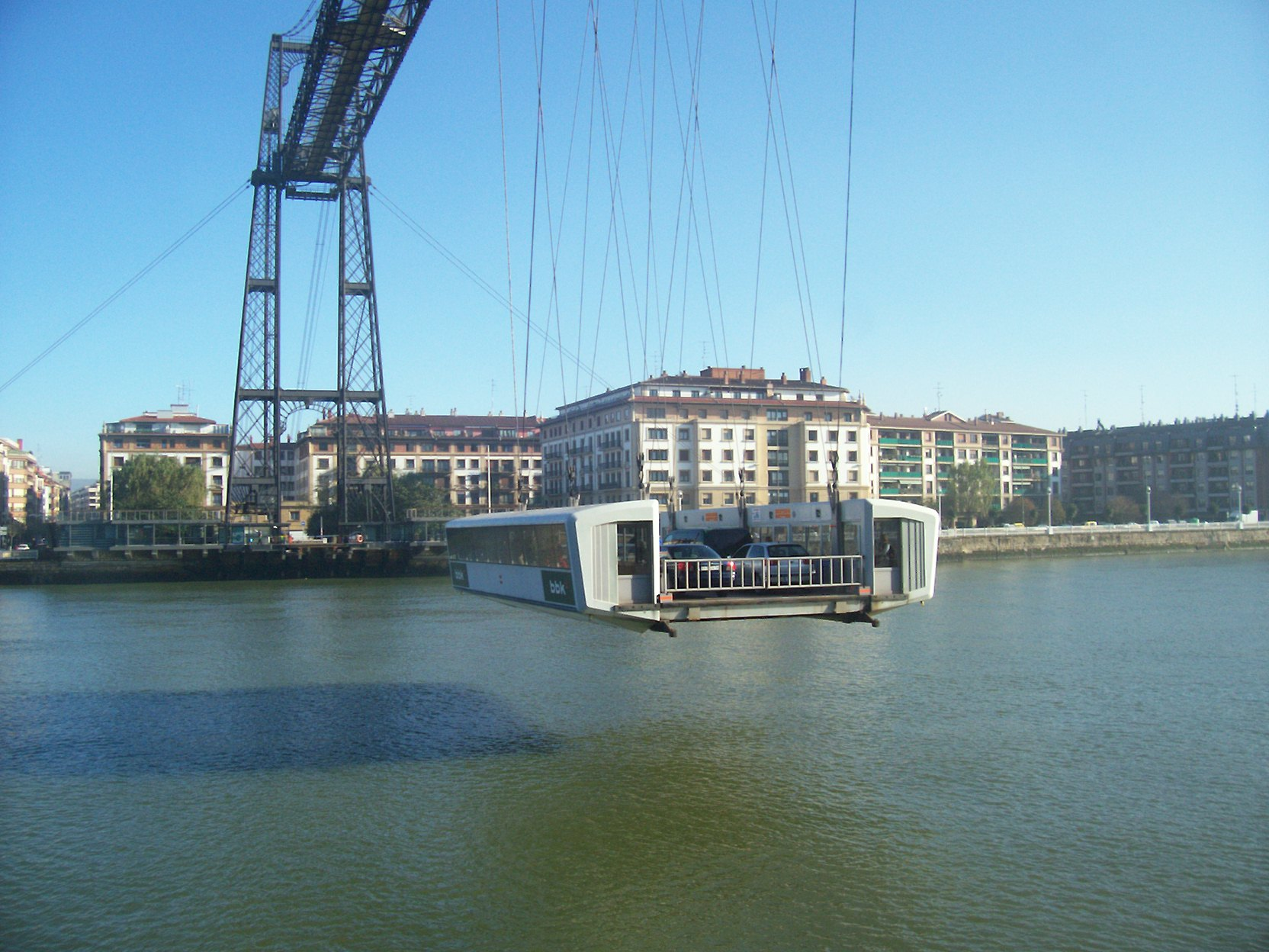 Transbordador del puente de Vizcaya, España